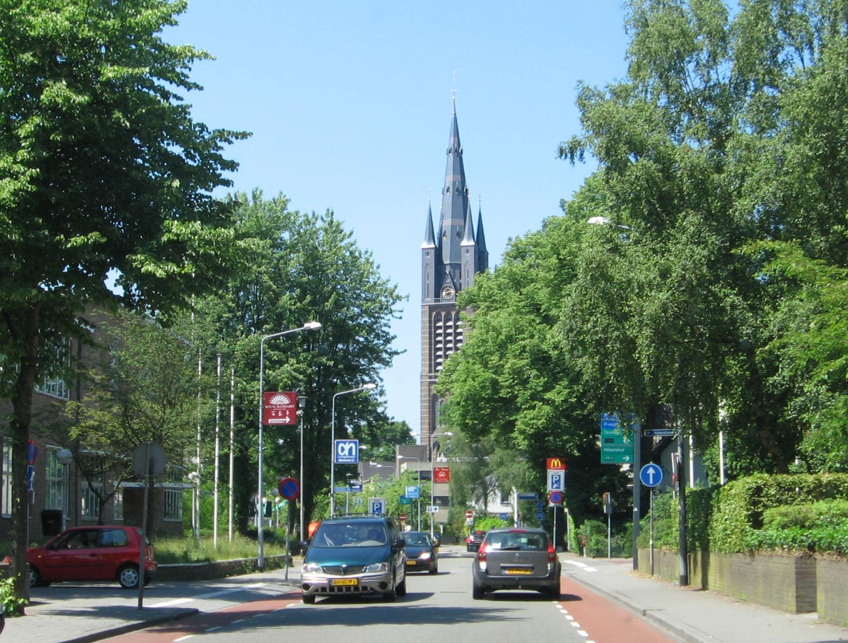 Hilversum, juni 2006